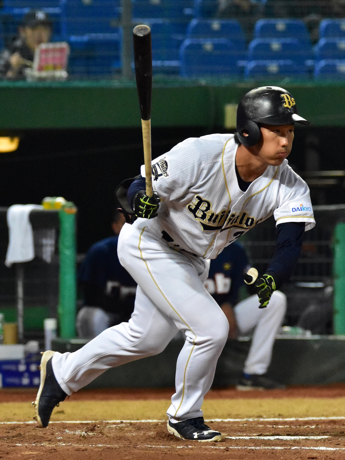 2016年12月18日台中インターコンチネンタル野球場にて